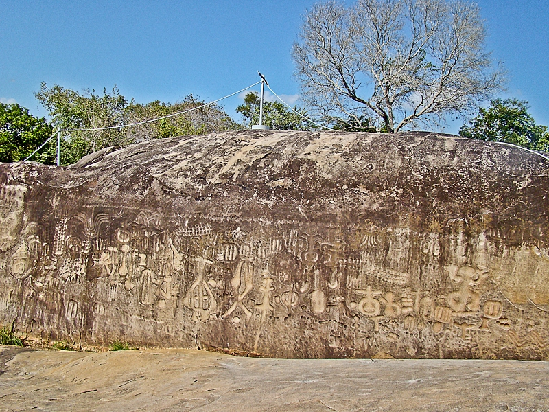 Inscrições rupestres.